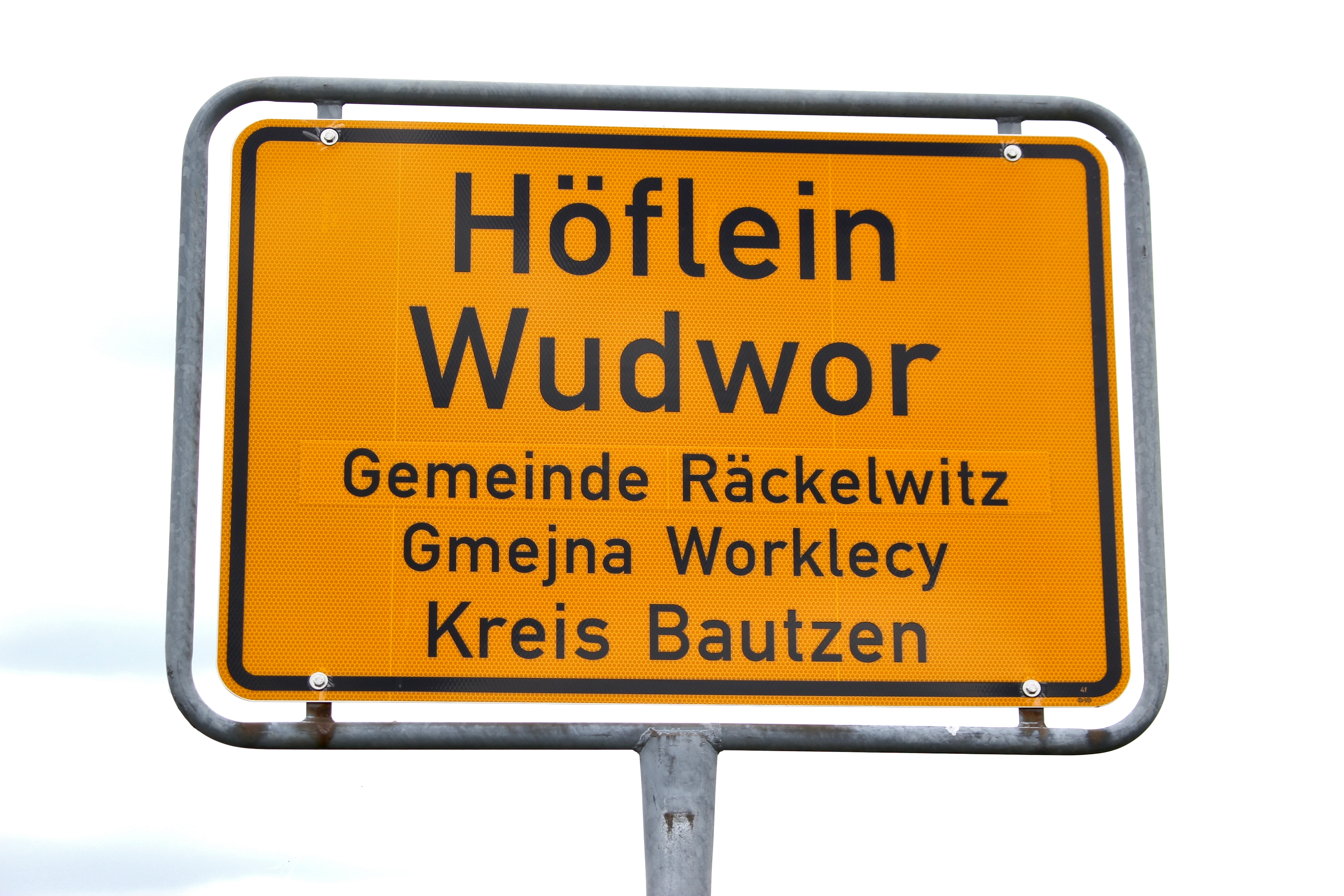 Hornjoserbsce: Wjesna tafla Wudworja